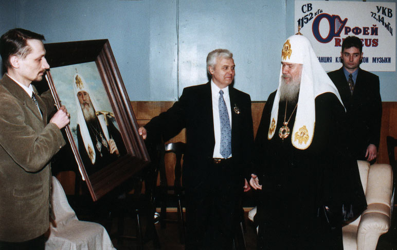 Вручение портрета Алексия II на его 70-летие. Автор портрета К. Ю. Горбунов. (слева направо К. Ю. Горбунов, Р. Н. Мурадов, Святейший Патриарх Алексий II)